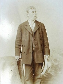 Heinrich Swoboda (1837-1910)